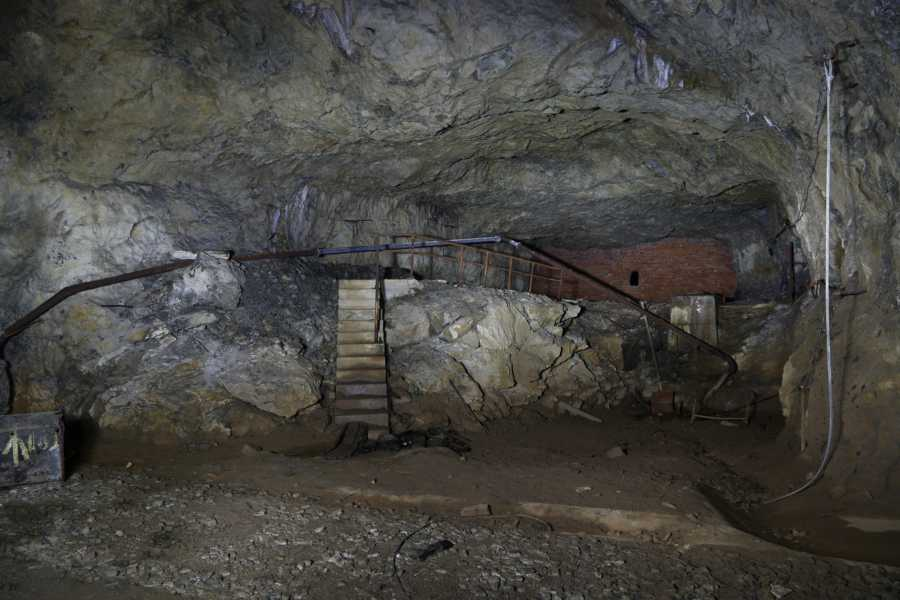 Das Projekt Schwalbe I war eines der größten geheimen Bauprojekte des Dritten Reiches. Die U-Verlagerung mit dem Decknamen „Eisenkies“ (der Mineralname ist hier die Kennung für eine neue, eigens eingerichtete Stollenanlage) ist eine der größten Stollenanlagen im Sauerland. Bauherr war die Firma Rheinbraun-Braun-Union Wesseling, die in der Stollenanlage ein Hydrierwerk zur Treibstoffherstellung und ein Dehydrierwerk zur Herstellung von Kerosin errichten ließ. 30.000 t Treibstoff sollten monatlich das Werk verlassen.